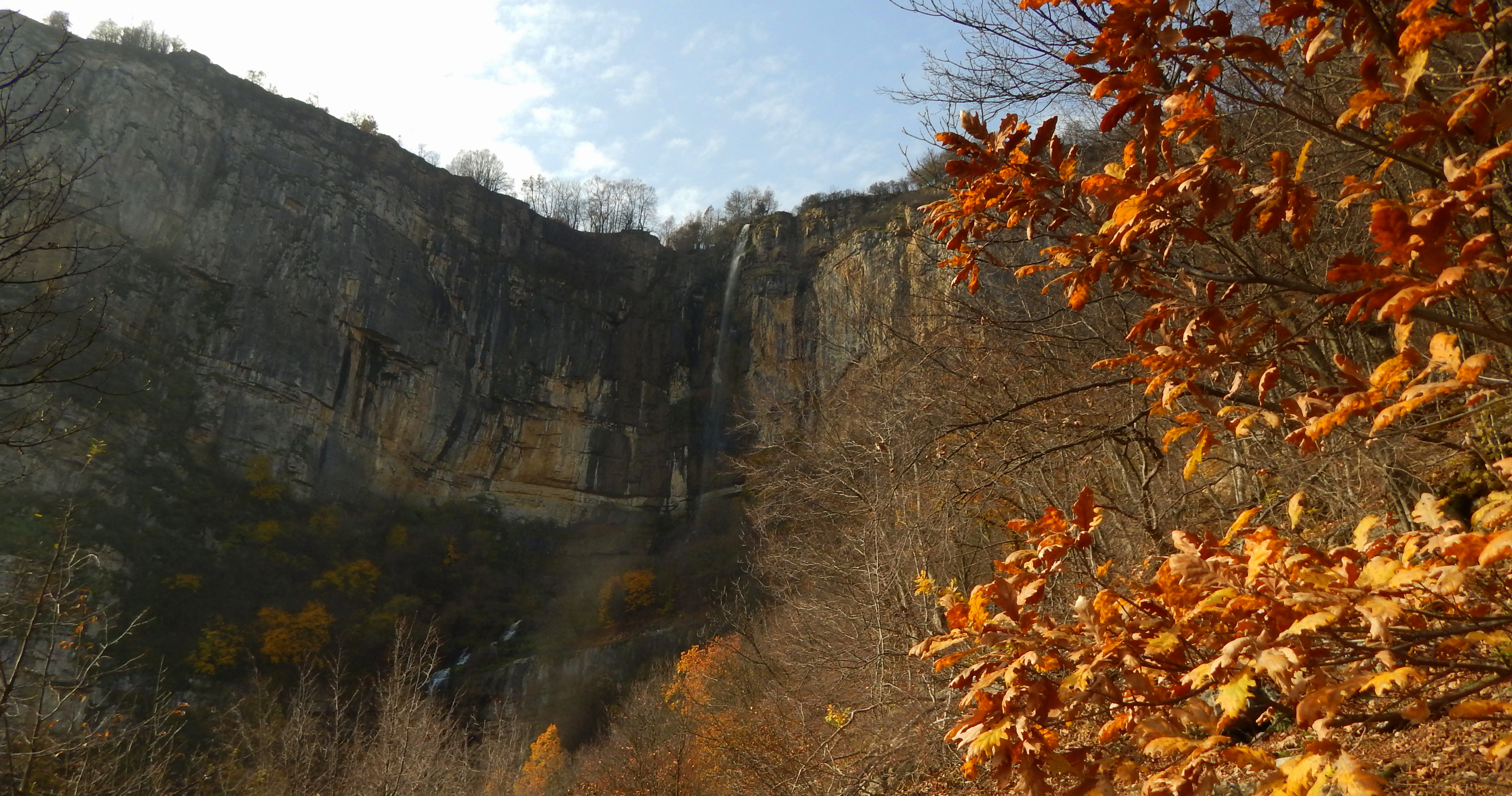 Водопадът Скакля в природен парк „Врачански Балкан”